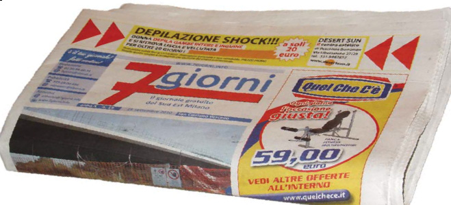 Copia cartacea di 7giorni - Il giornale del Sud Est Milano